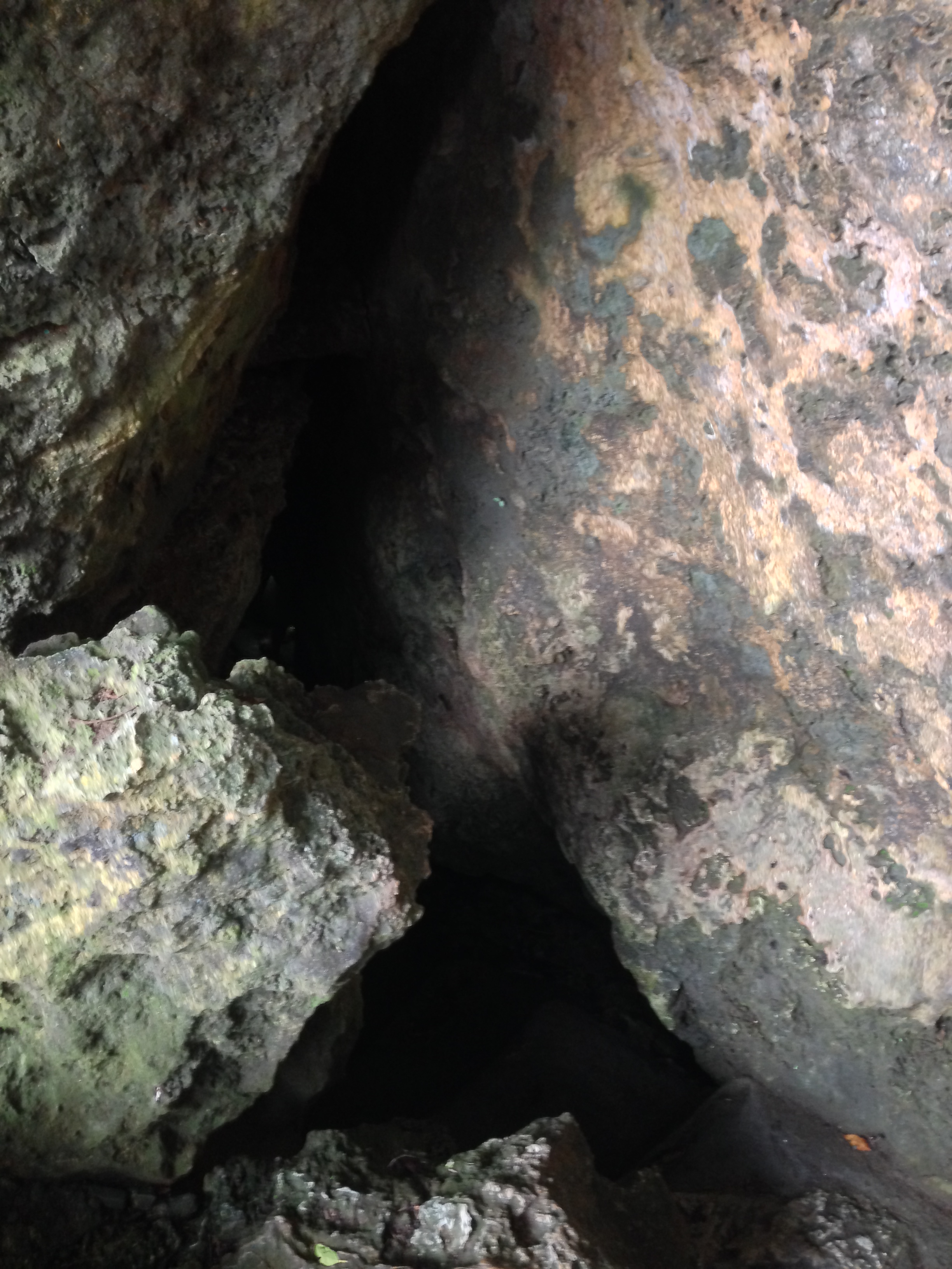 中文（台灣）: 烏鬼洞出口